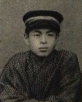 古畑種基（20歳、第三高等学校医学部生時代）